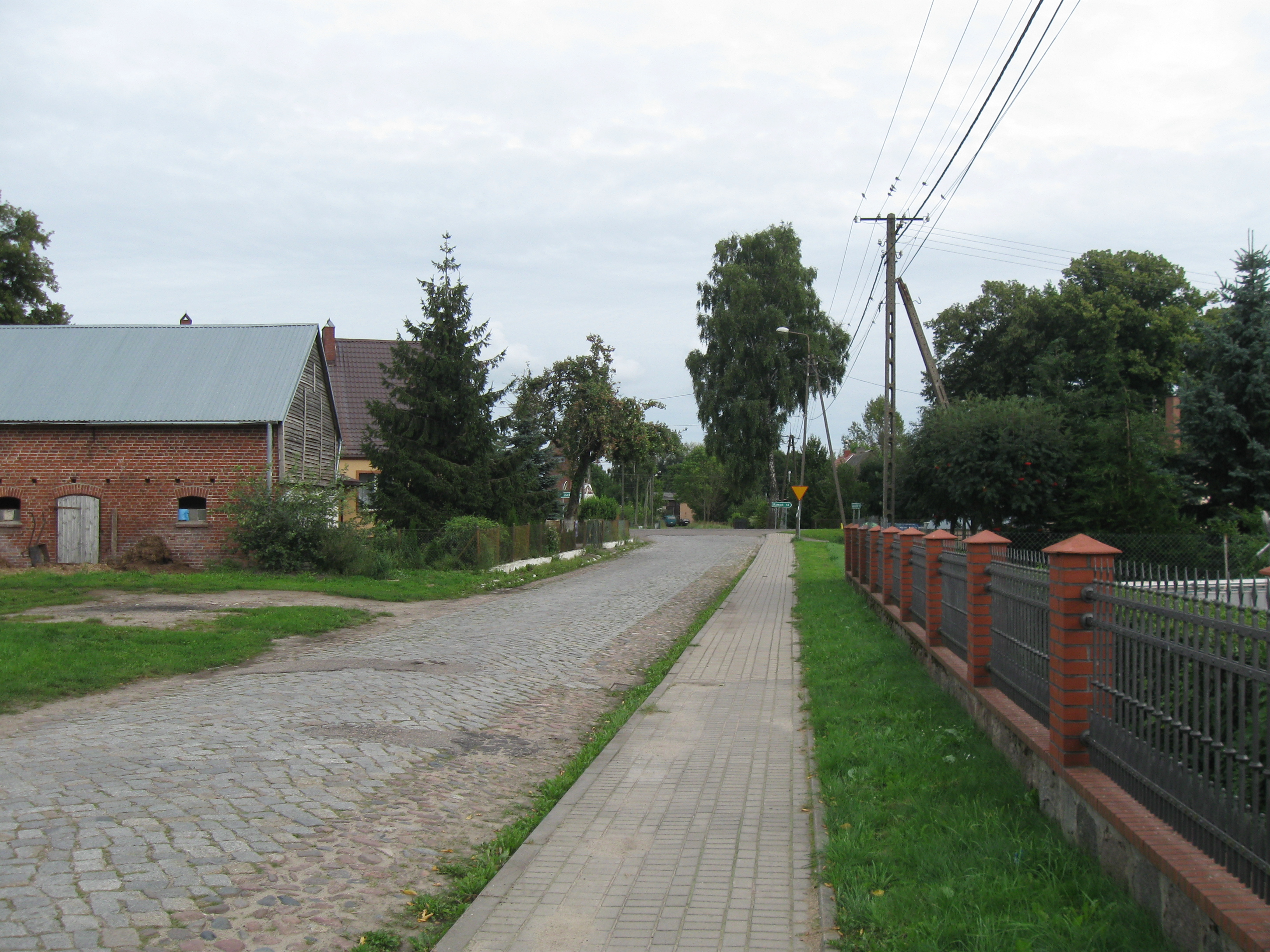 Białokury - centrum. Zbieg tras Rościęcino - Rzesznikowo i Białokury - Świecie Kołobrzeskie